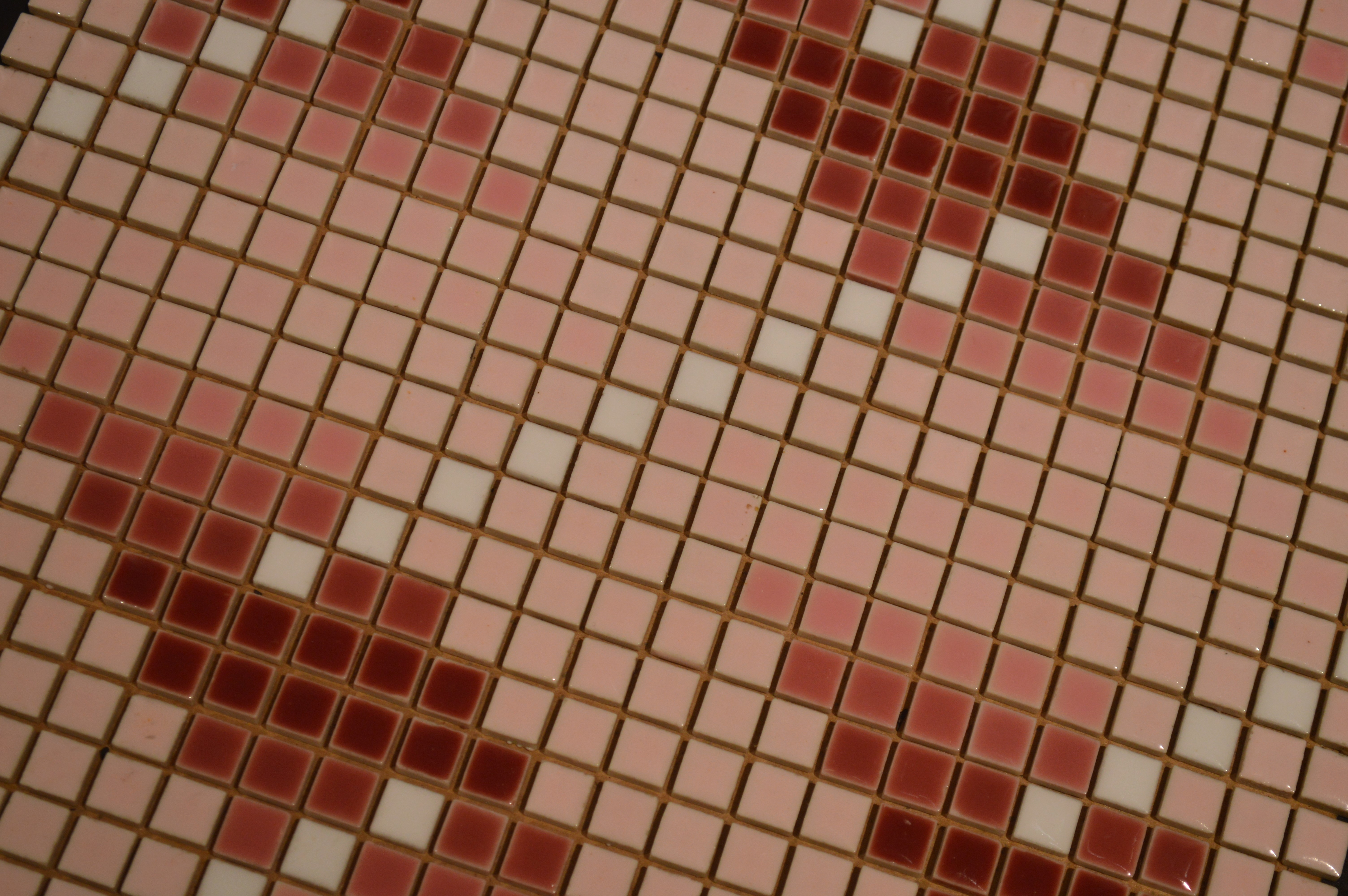 岐阜県多治見市の多治見市モザイクタイルミュージアム。正方形のモザイクタイル。